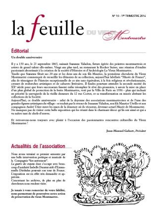 La feuille, journal d’information du Centre Culturel du Vieux Montmartre